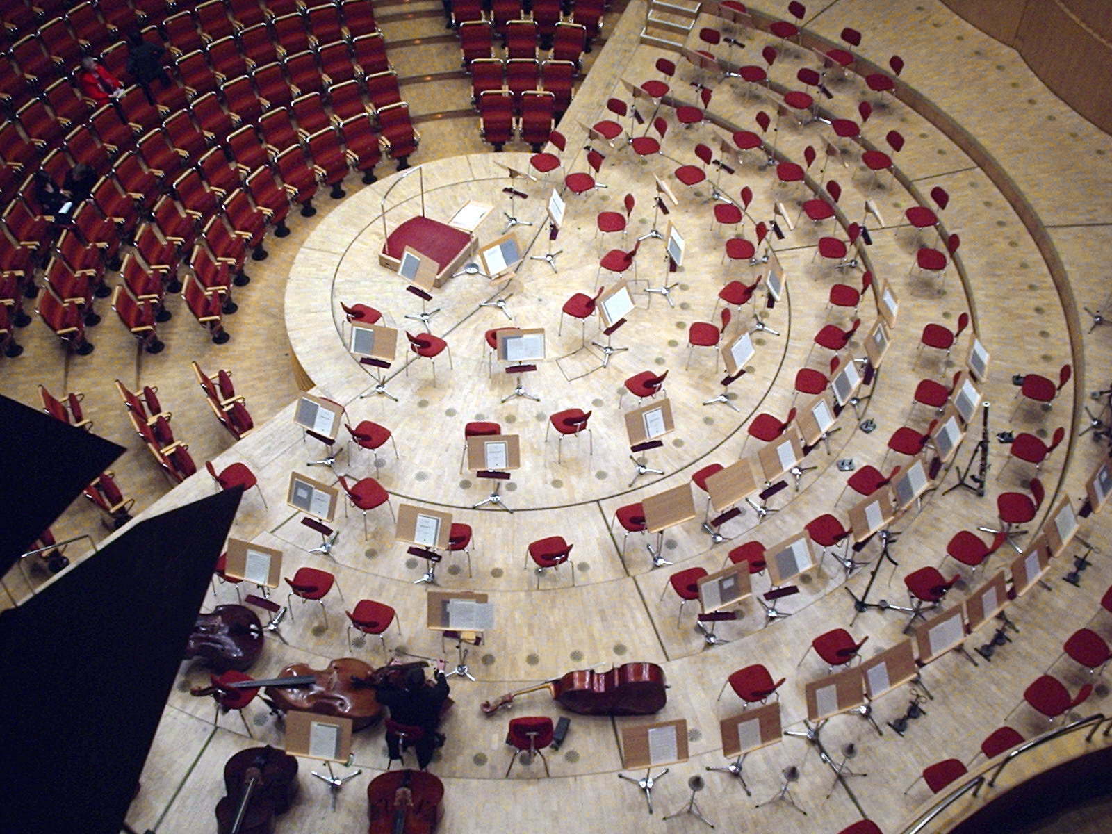 D'Bün vun der Kölner Philharmonie